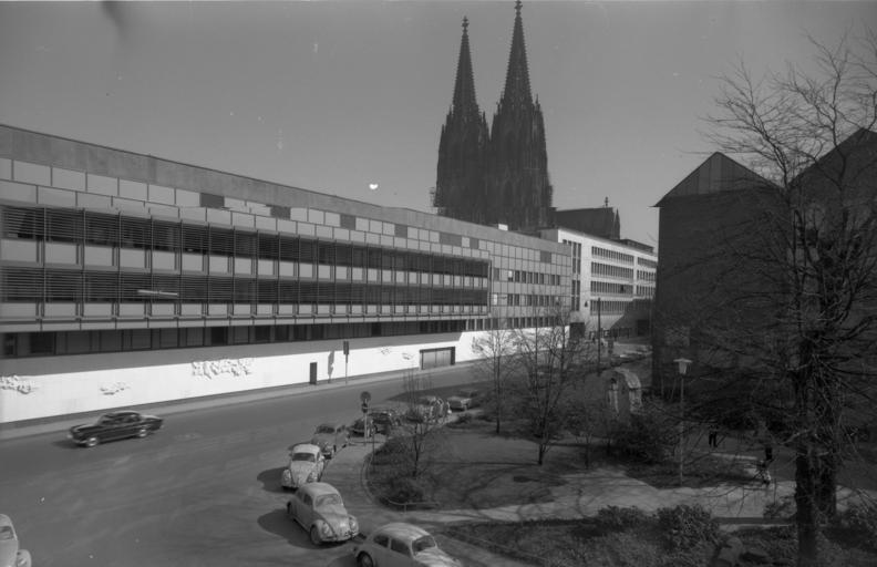 Köln Seitenflügel des WDR-Funkhauses an der Rechtschule